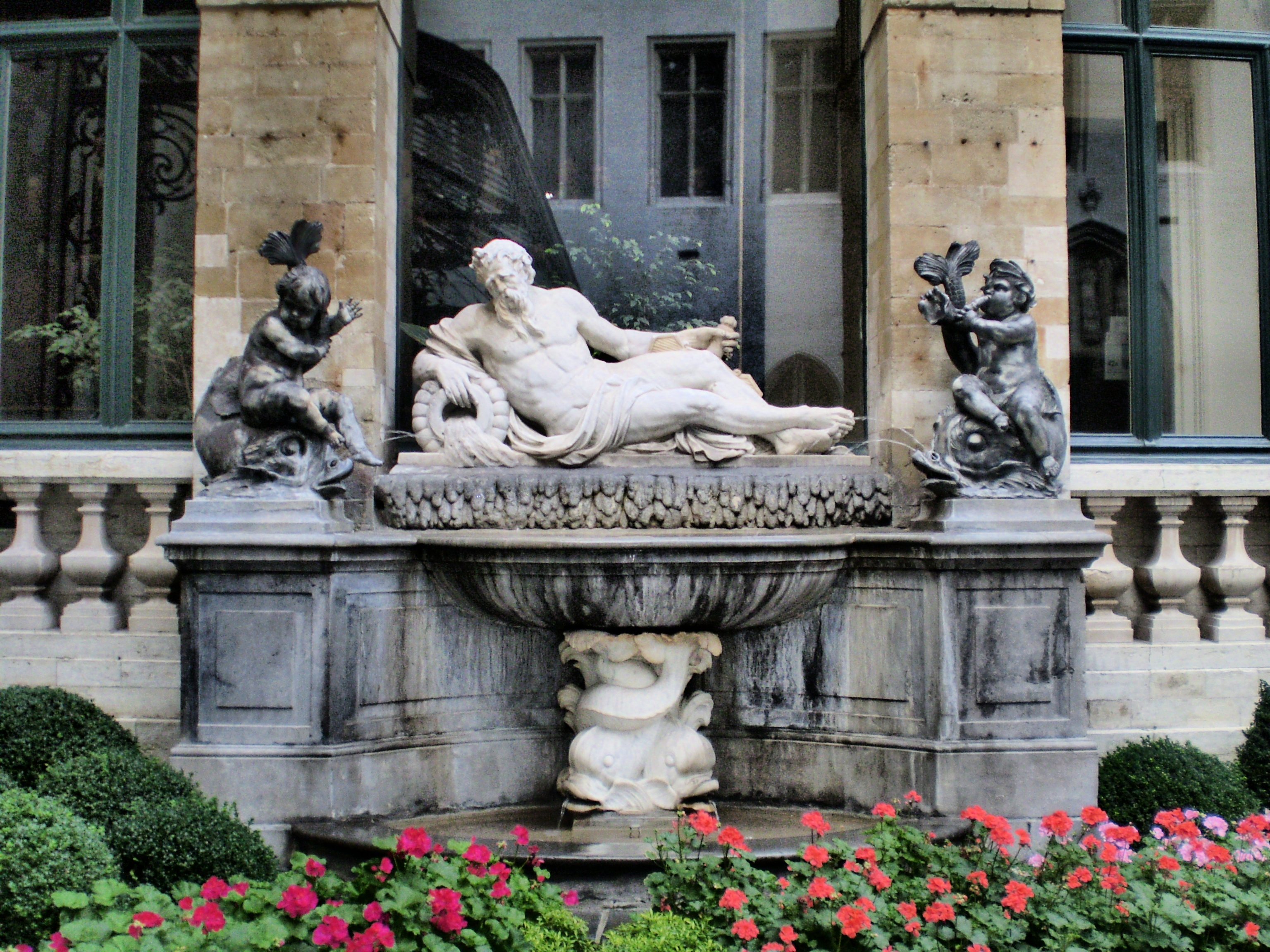 Hôtel de Ville de Bruxelles, cour centrale: La Meuse par Jean de Kinde, 1715